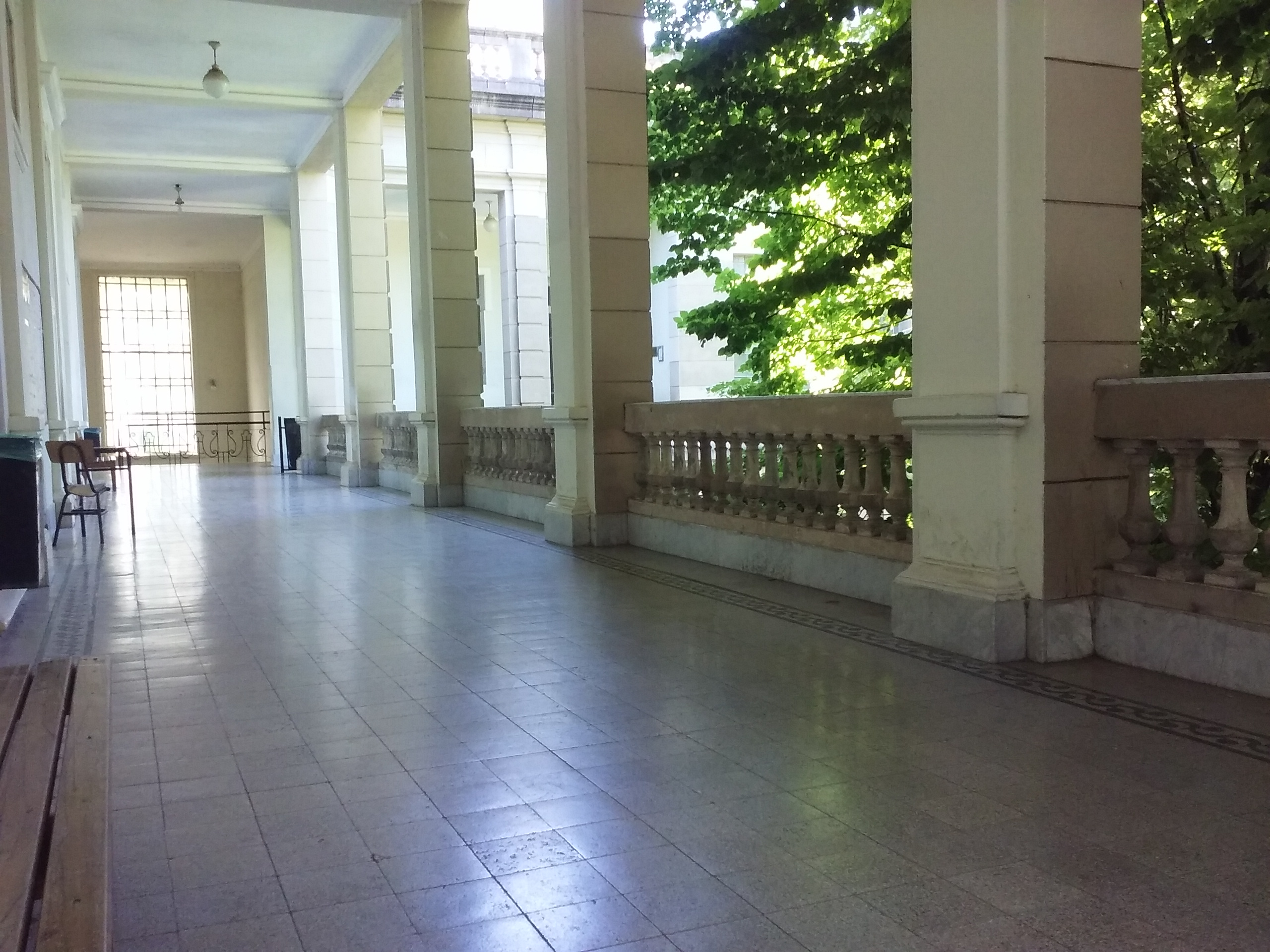 Segundo piso del sector de Lengua y Literatura, nov 18/11/16